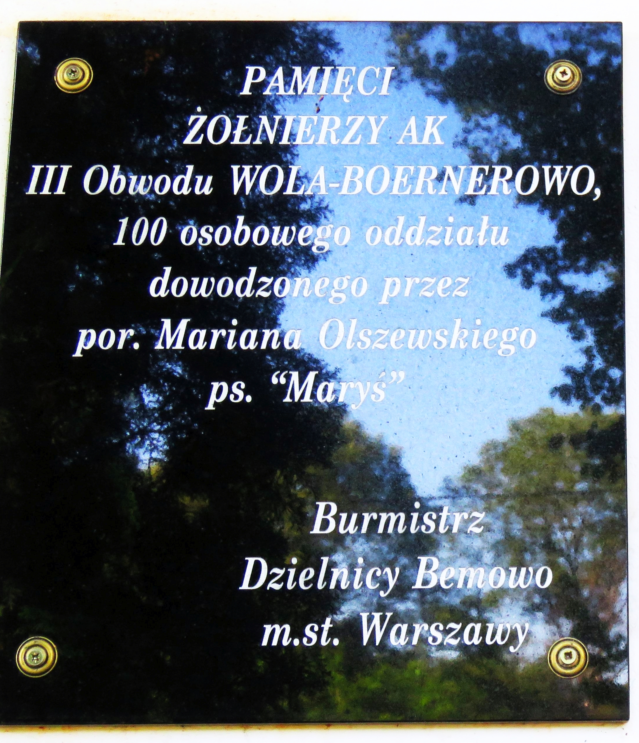 WIERSZE Kościół p.w. Św. Maksymiliana Marii Kolbe TABLICA NA KOŚCIELE 06